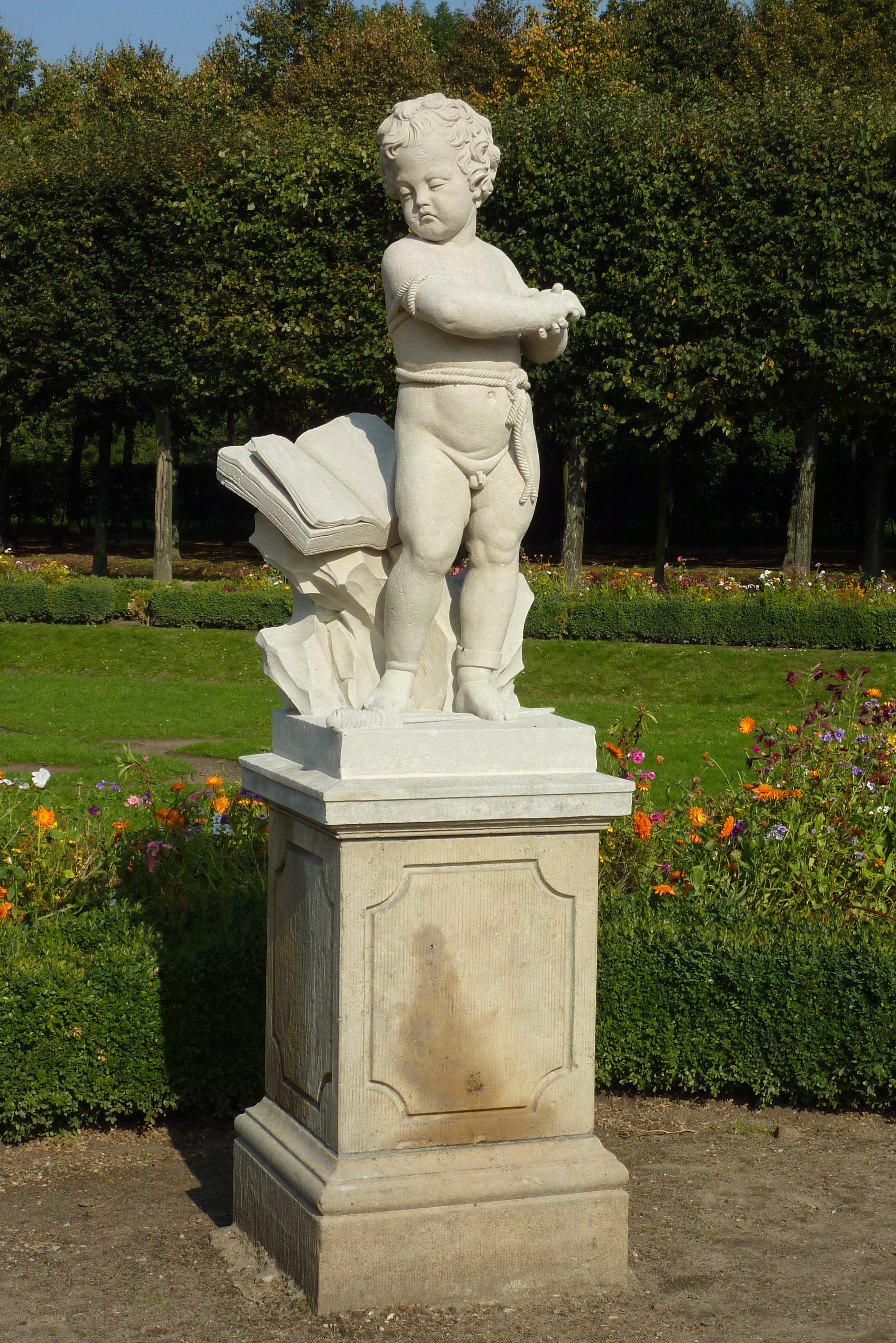 Skulptur „Melancholiker“ der „Vier Temperamente“ nach Gottfried Knöffler, Nordostposition im nördlichen Rondell des Schlossgartens im Tierpark Berlin (Friedrichsfelde). Kopie von Rolf Winkler und Heinz Worner aus dem Jahr 1960.